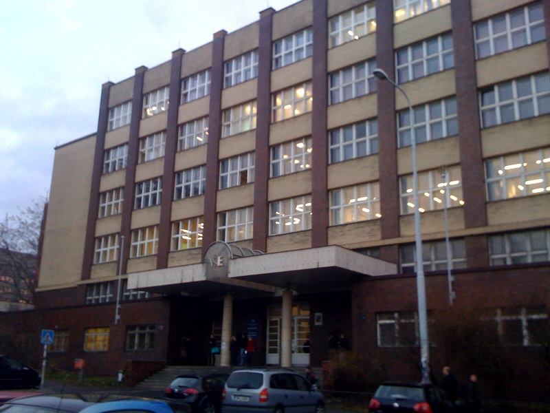 Stará budova VŠE